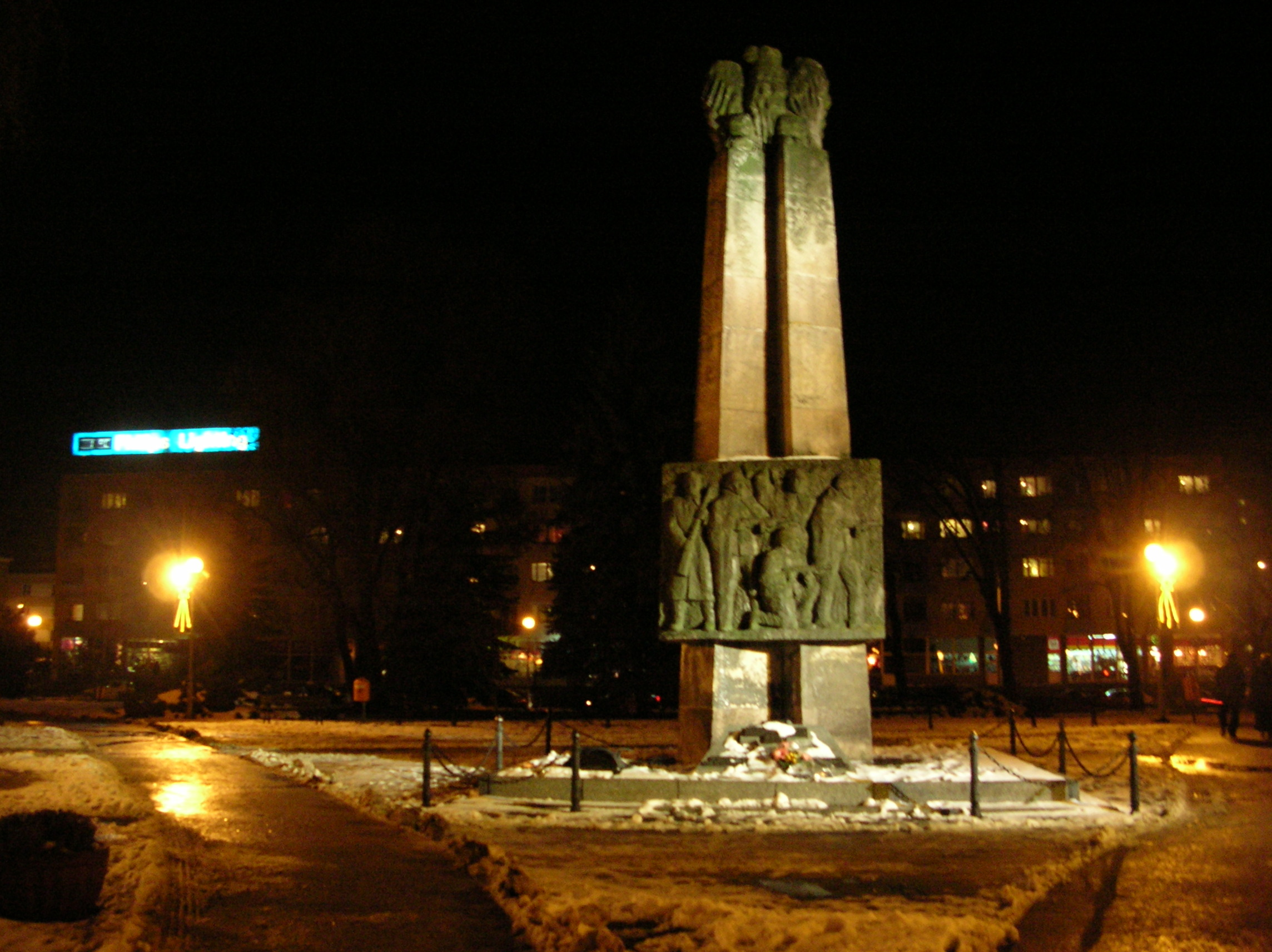 Piła - Pomnik Zwycięstwa nocą Autor - Bartek Wawraszko